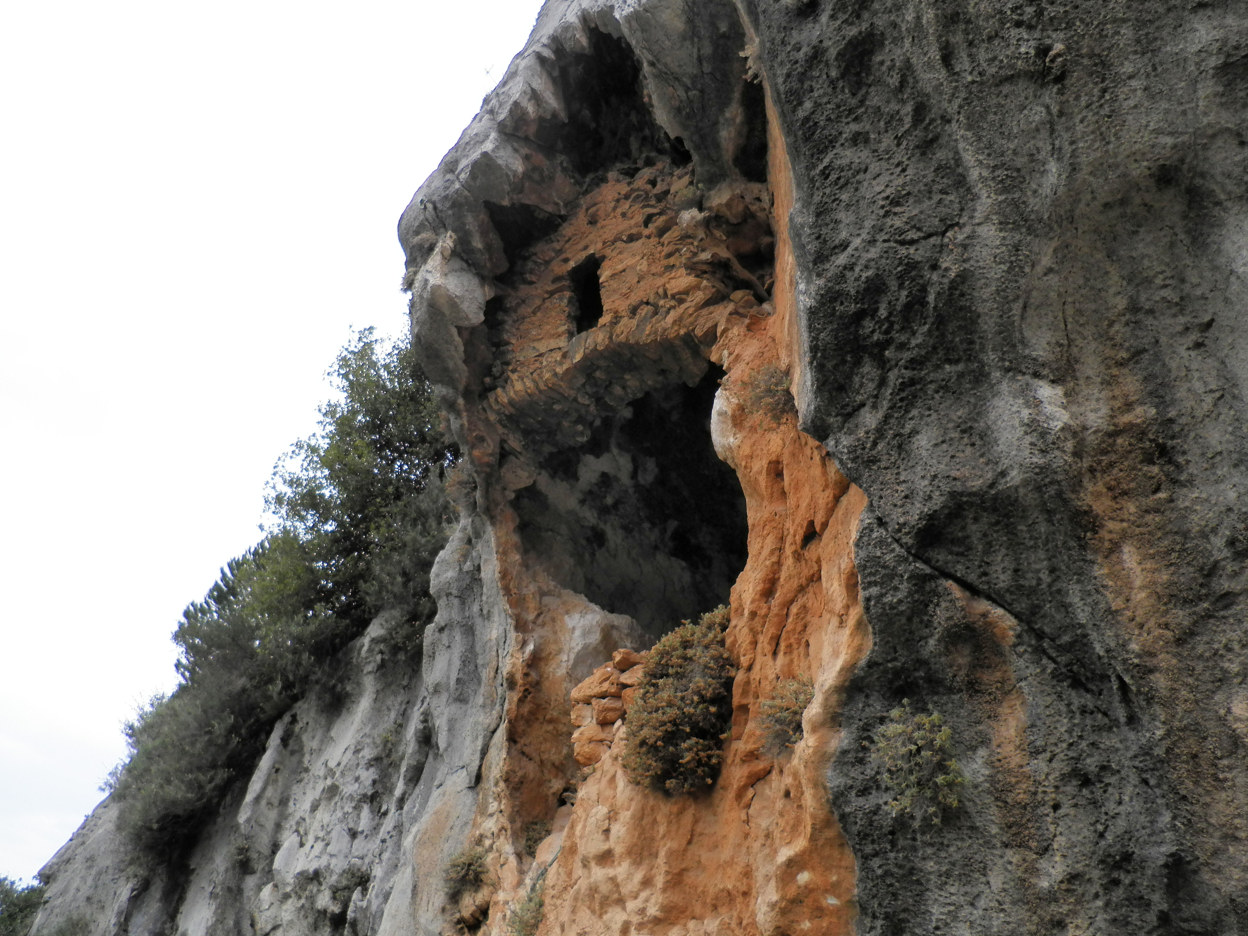 Fidar El Tahta, Lebanon